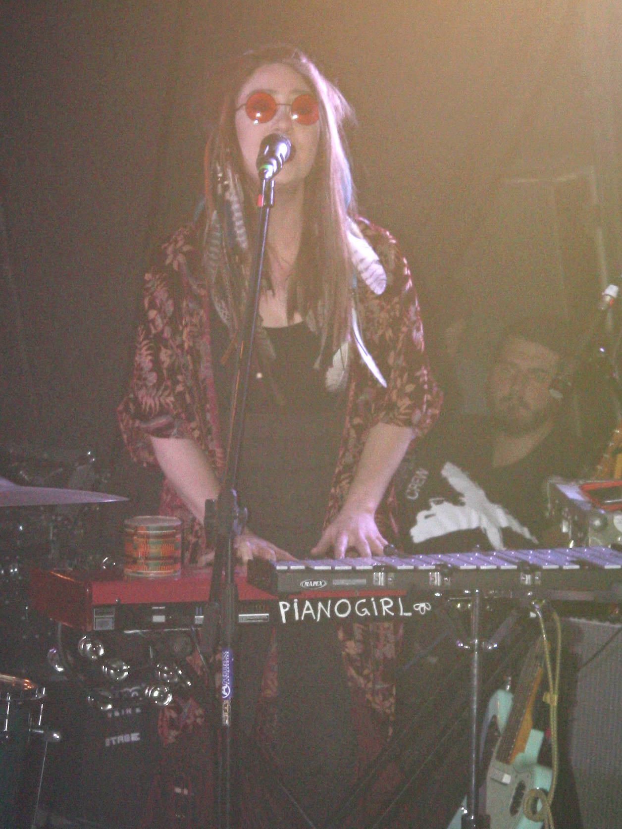 Гурт Pianoбой на фестивалі Razomfest 2018 у Львові